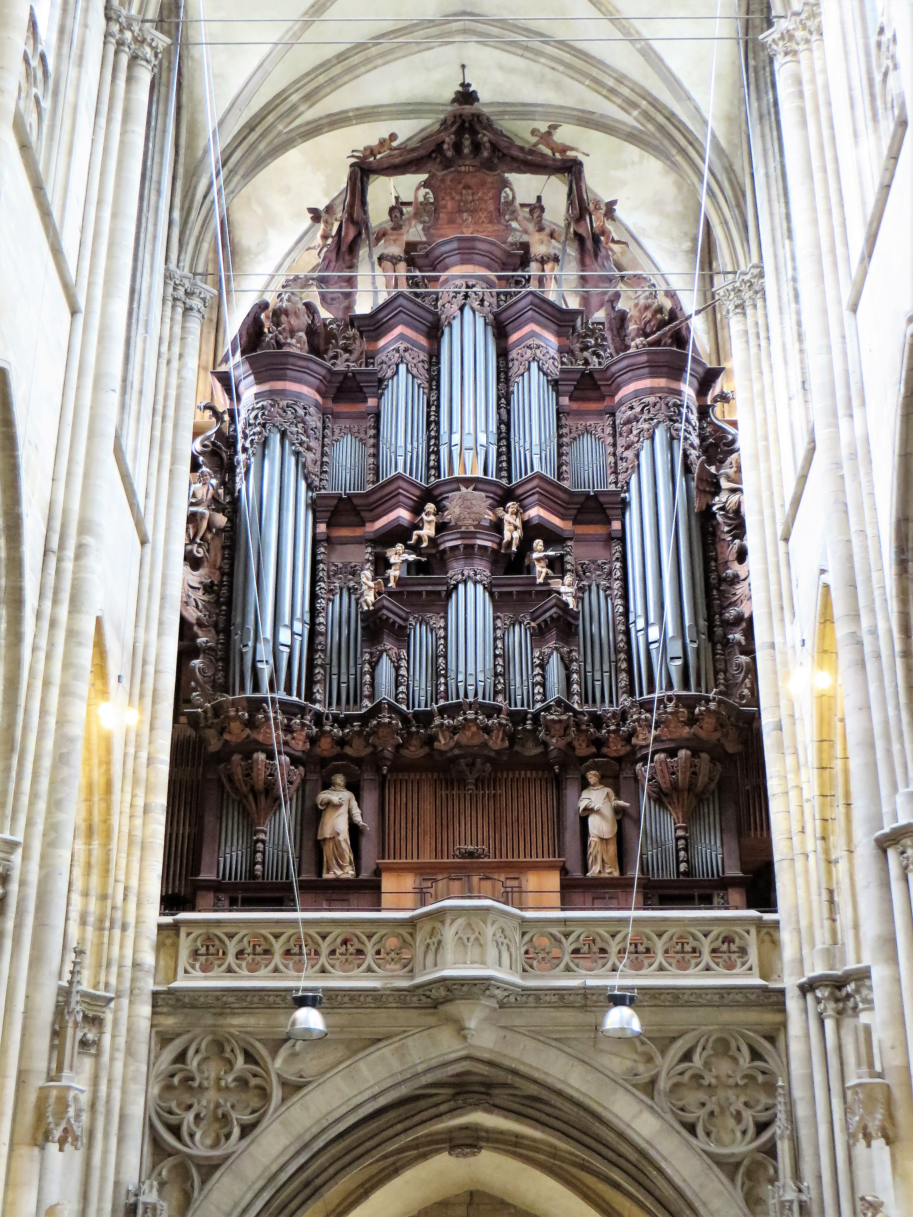 Dom zu Halberstadt. Barocker Orgelprospekt.